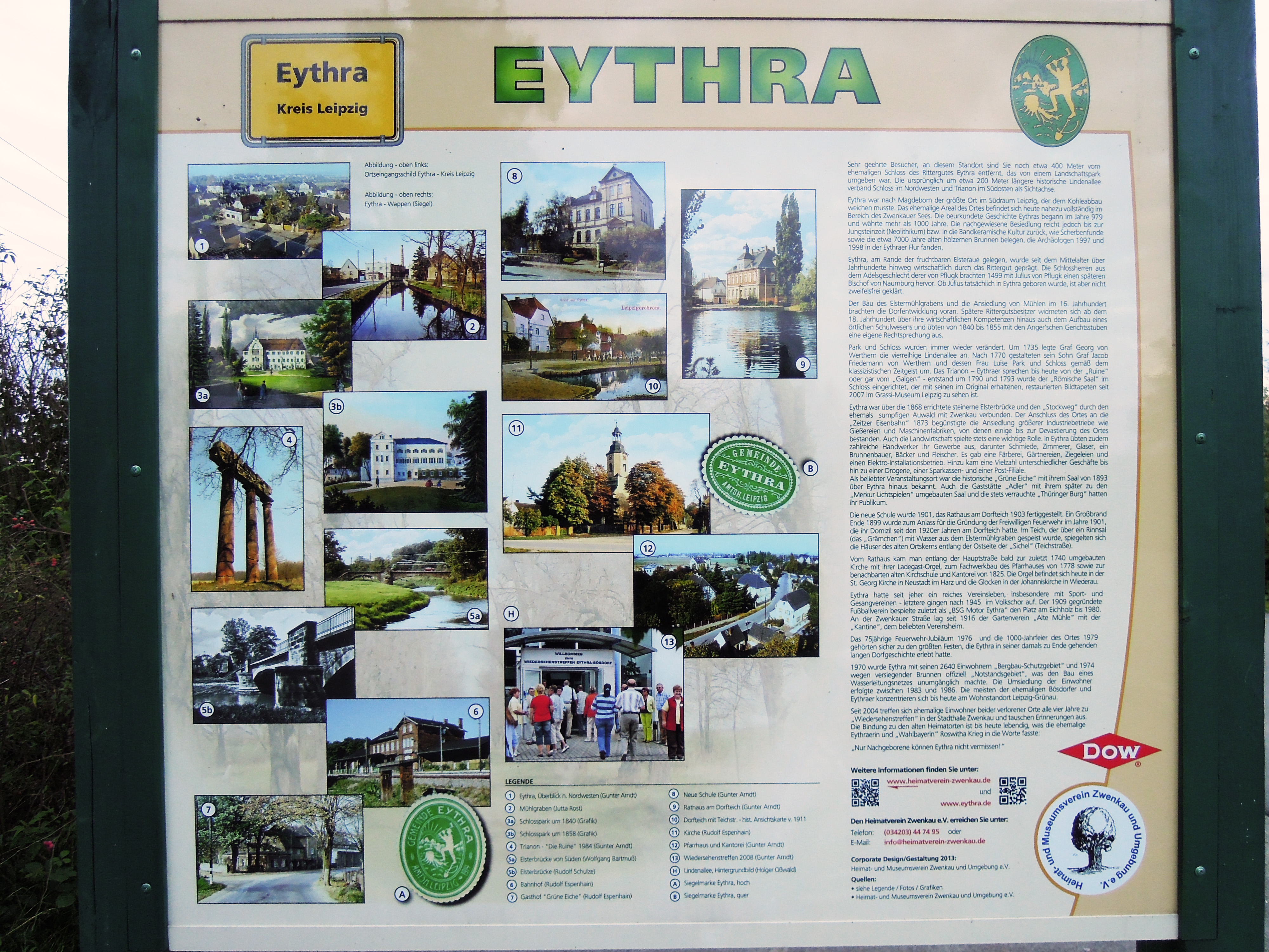 Zwenkauer See Rastplatz Lindenallee (kgl. preuss. Seite): Informationstafel zu Eythra